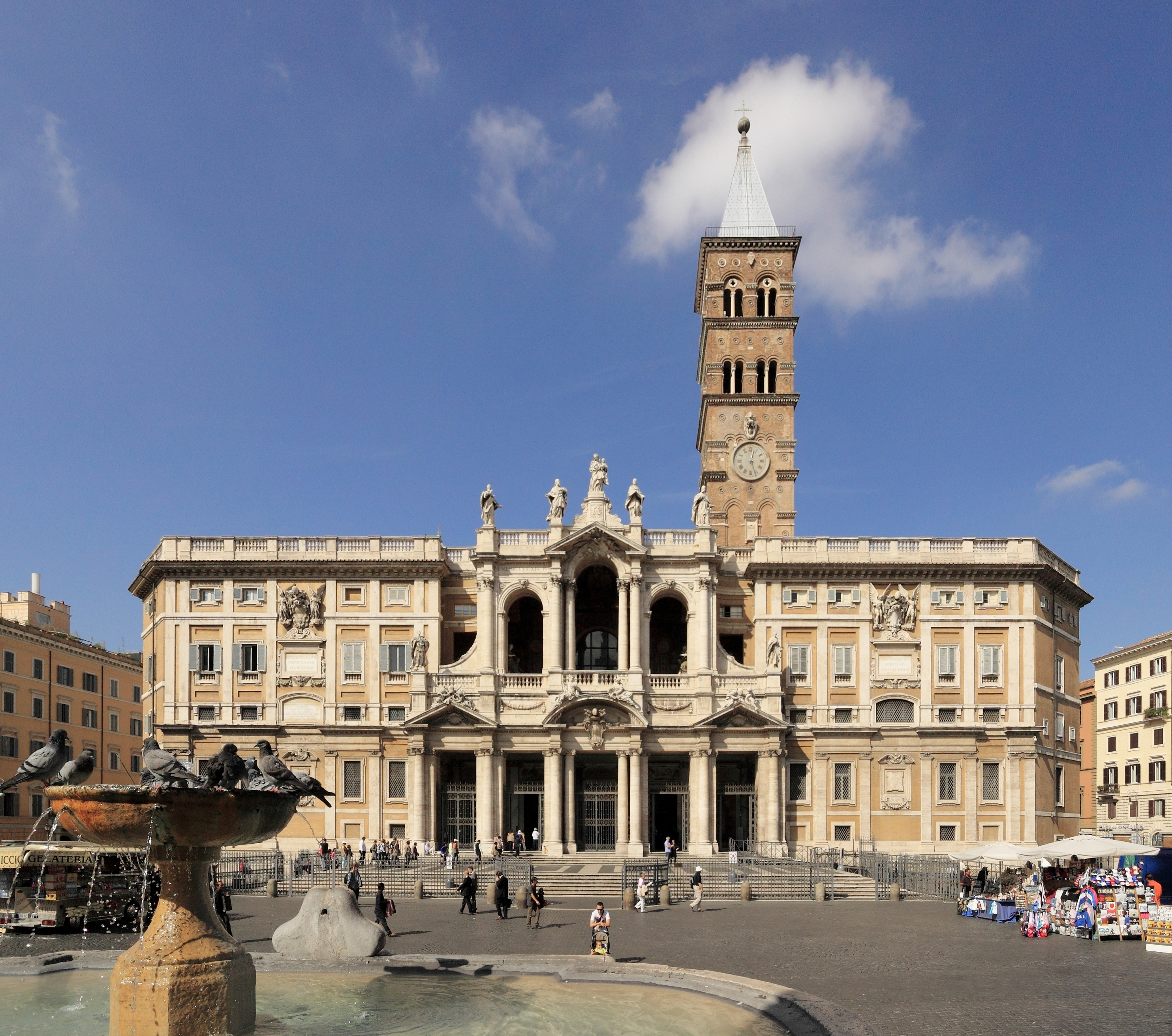 Santa Maria Maggiore Front